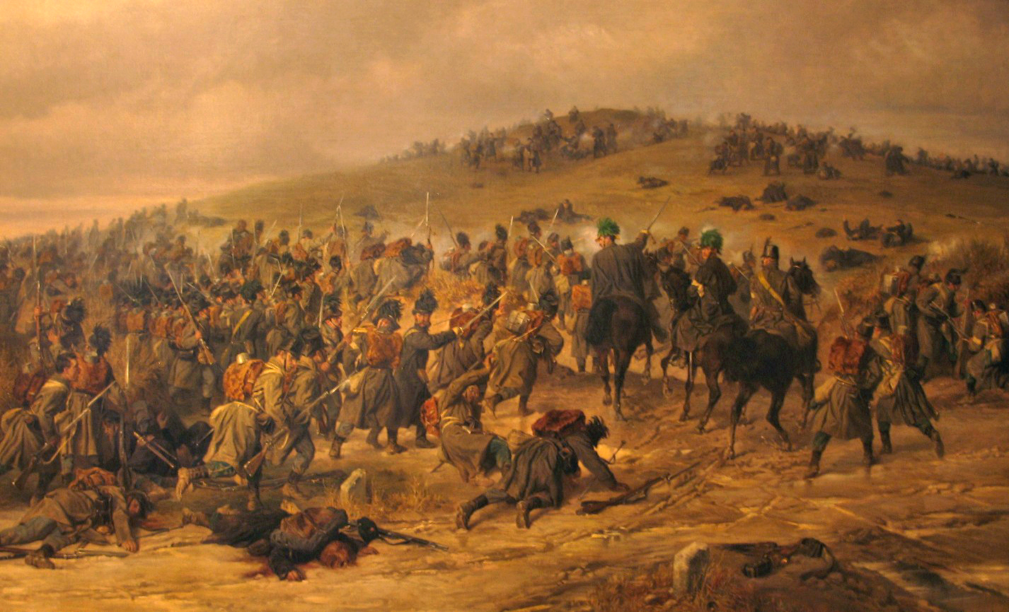 Die Erstürmung des Königsberges bei Oberselk durch das k.u.k. 18. Jägerbataillon am 3. Februar 1864.title QS:P1476,de:"Die Erstürmung des Königsberges bei Oberselk durch das k.u.k. 18. Jägerbataillon am 3. Februar 1864." label QS:Lde,"Die Erstürmung des Königsberges bei Oberselk durch das k.u.k. 18. Jägerbataillon am 3. Februar 1864."